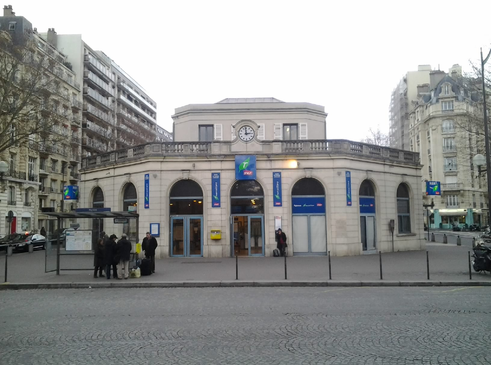 Gare de Courcelles-Levallois (Paris 17e) - 4 janvier 2014.